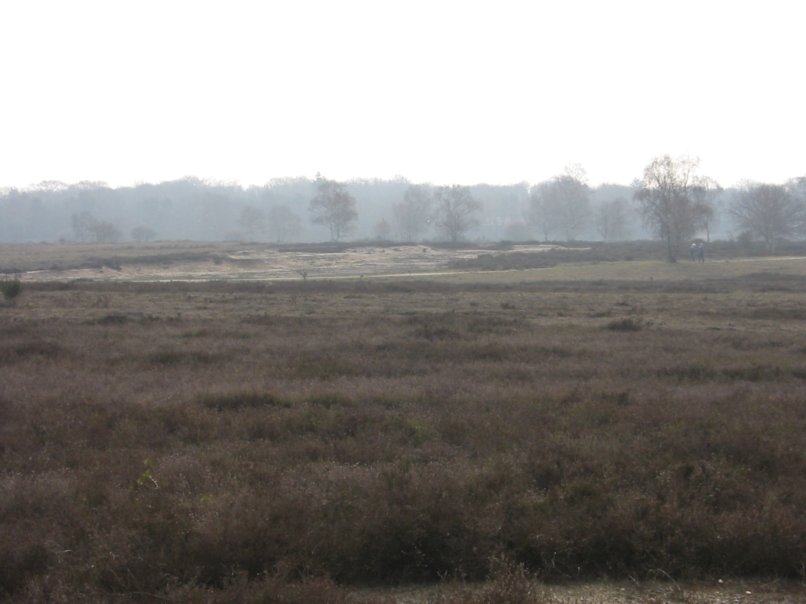 eigen foto: Heide bij Laren. GerardM 2 apr 2004 21:40 (CEST)